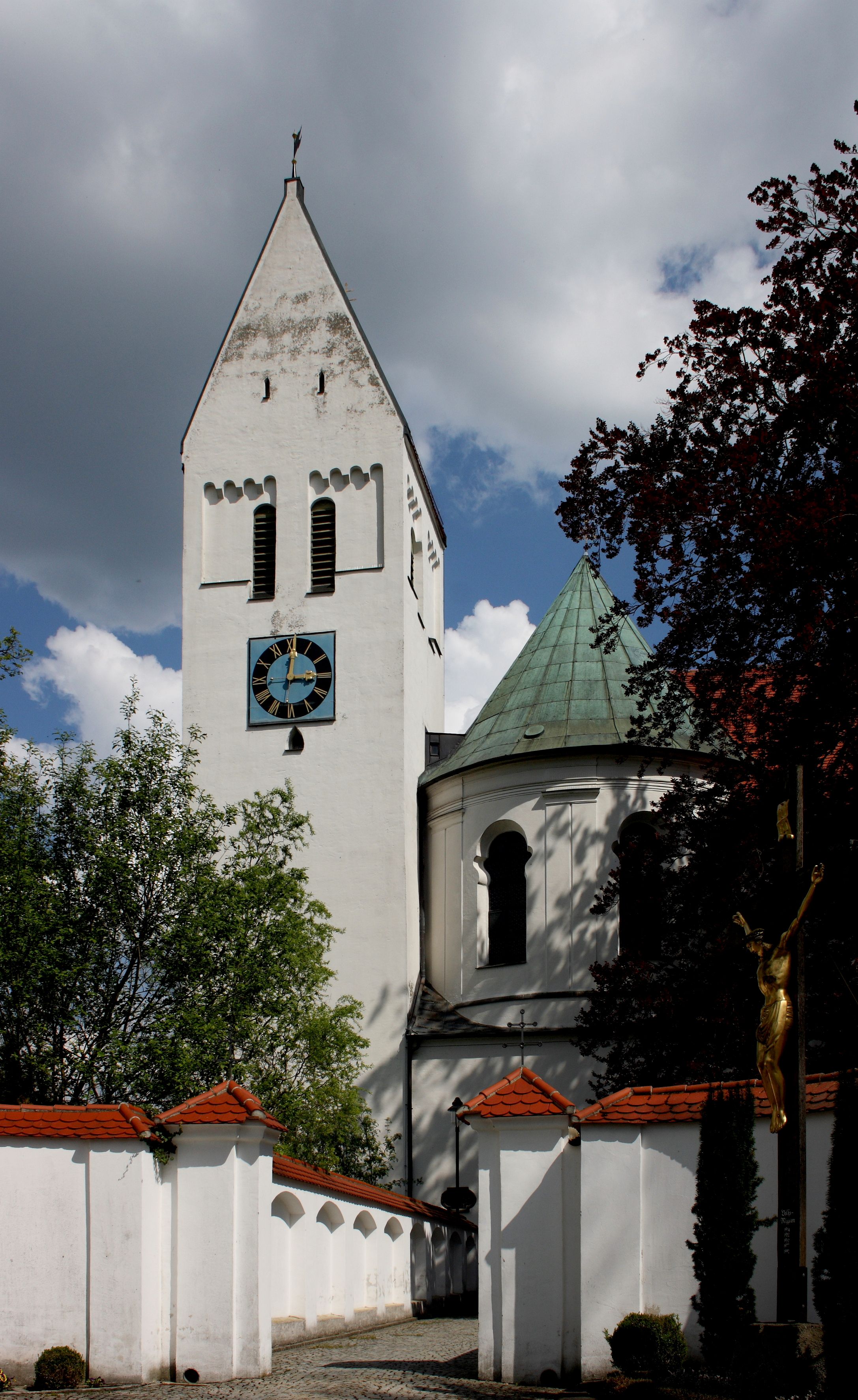 Katholische Pfarrkirche St. Peter und Paul (ehemalige Abteikirche des Klosters Thierhaupten) in Thierhaupten, einer Gemeinde im Landkreis Augsburg, Ansicht von Westen